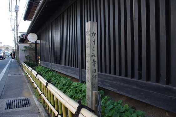 寺役所跡（現在はレストラン）。